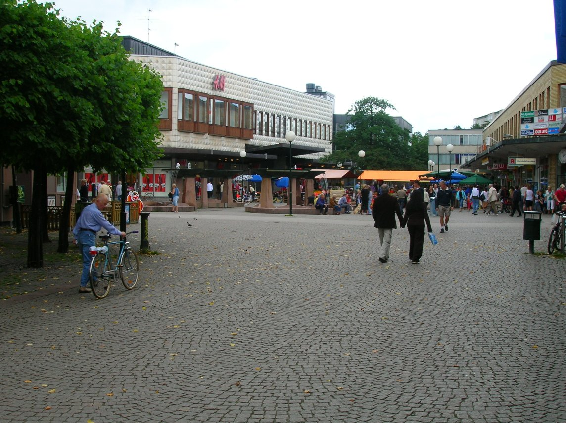 Farsta torg, Farsta, Stockholm, Sweden.